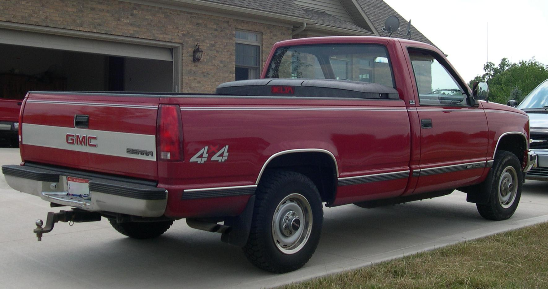 1989 GMC K1500 4x4 regular-cab pickup